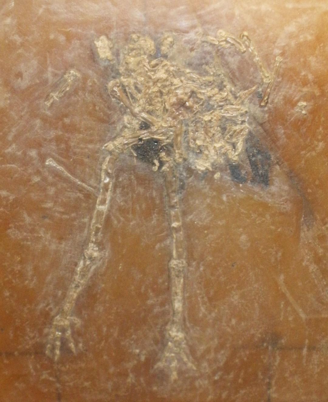 Fossil of Idiornis, an extinct bird Took the photo at Musee d'Histoire Naturelle, Brussels